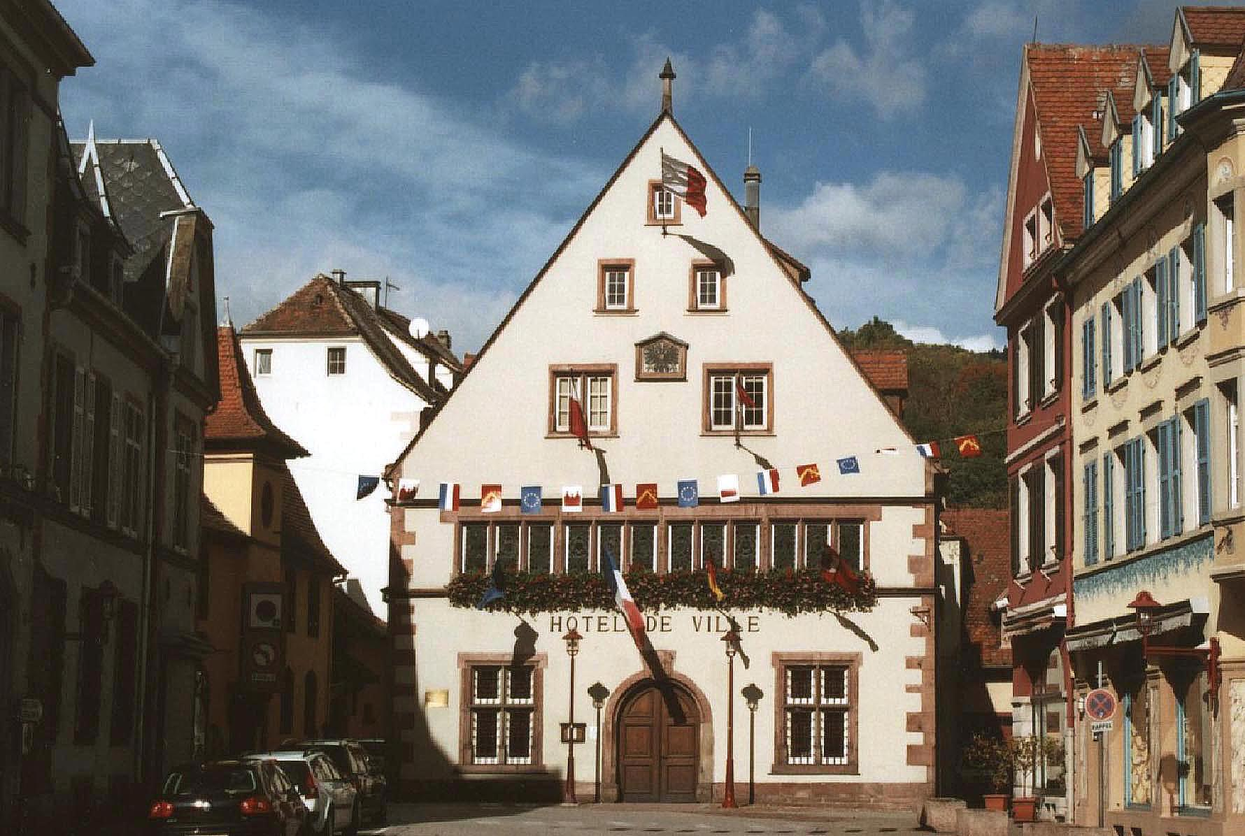 Mairie de Munster (Haut-Rhin)